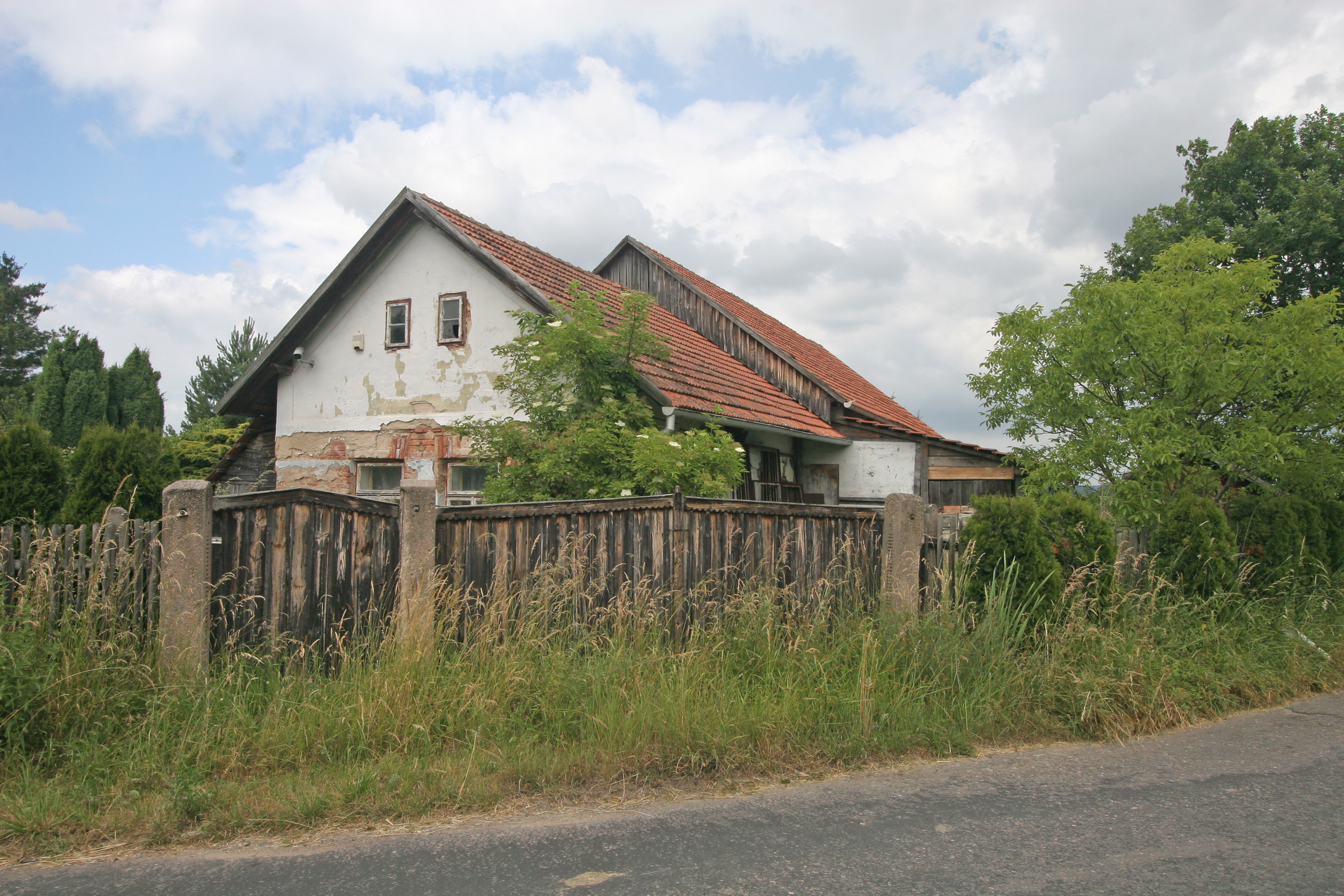 Drahoš čp. 20